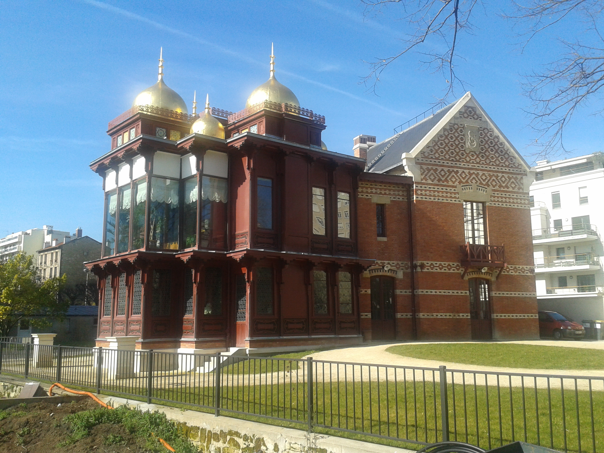 Pavillon des Indes, Courbevoie, France